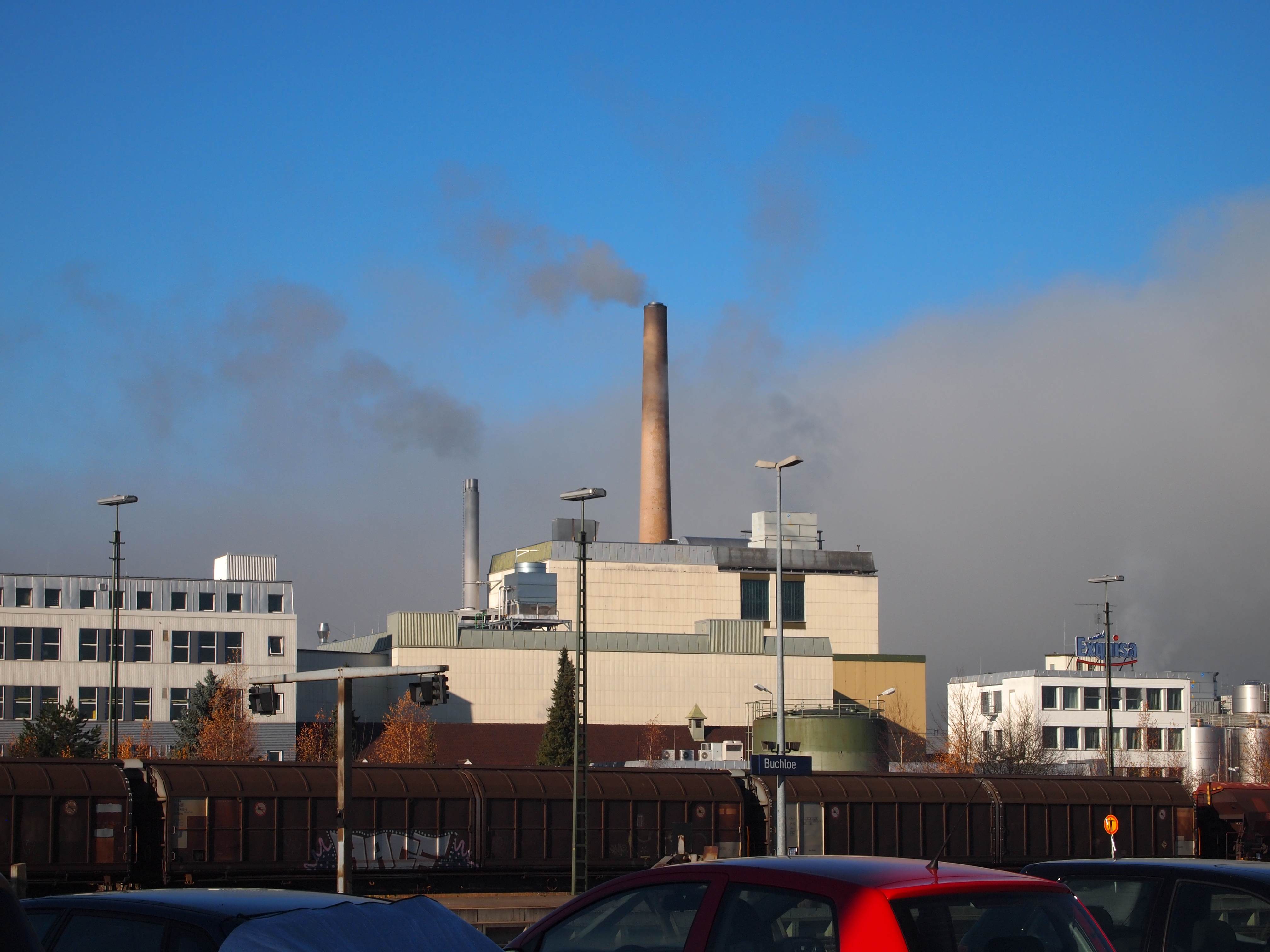 Blick vom Bahnhofsgelände Buchloe auf die Gebäude der Karwendel-Werke Huber